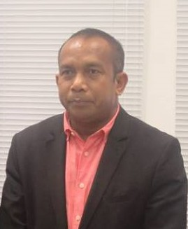 Francisco Kalbuadi Lay, Tourismusminister Osttimors